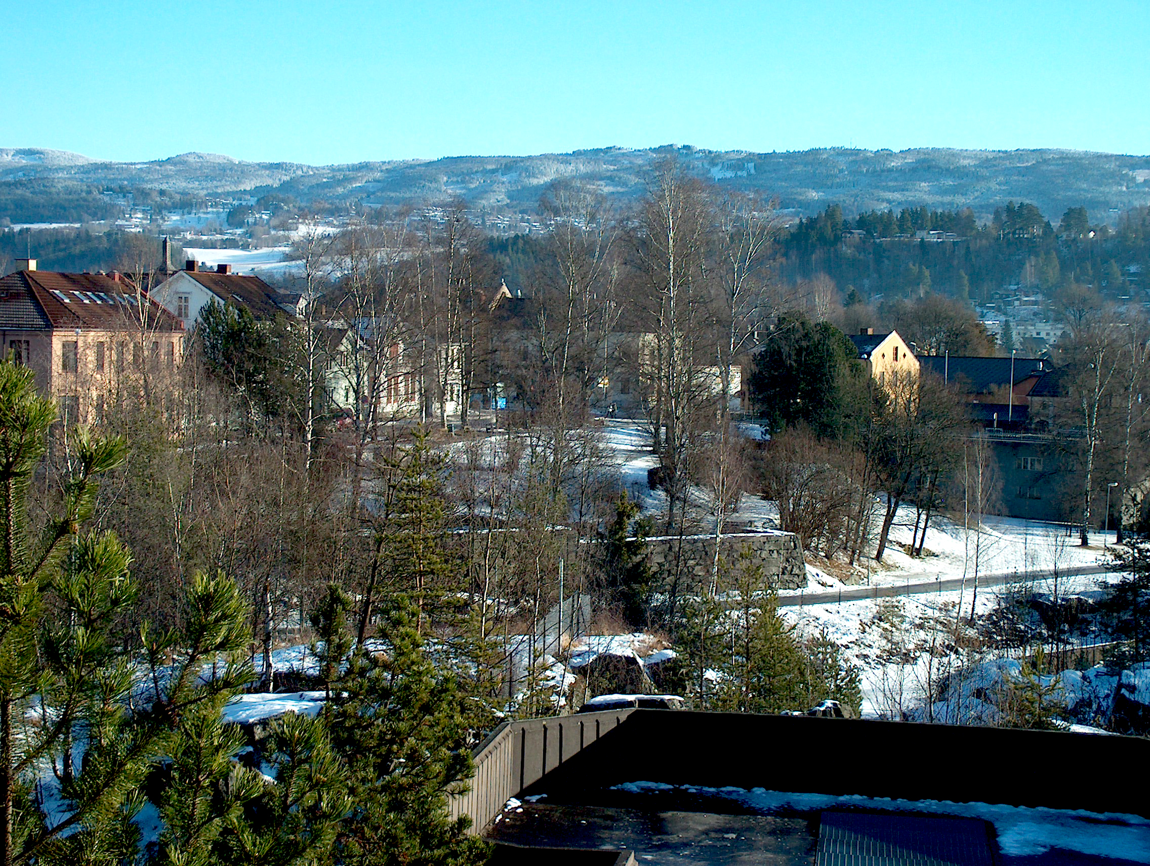 Nordsiden av Hønefoss, der byens opprinnelige bebyggelsen begynte (Nordre park)